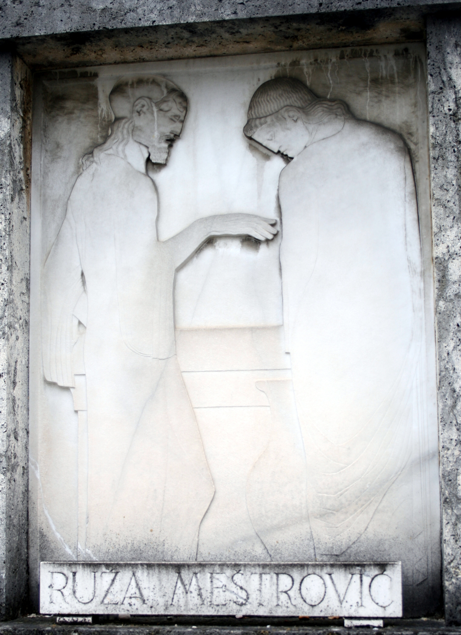 djelo Ivana Meštrovića na grobu prve supruge Ruže Meštrović na Mirogoju, Zagreb, Hrvatska